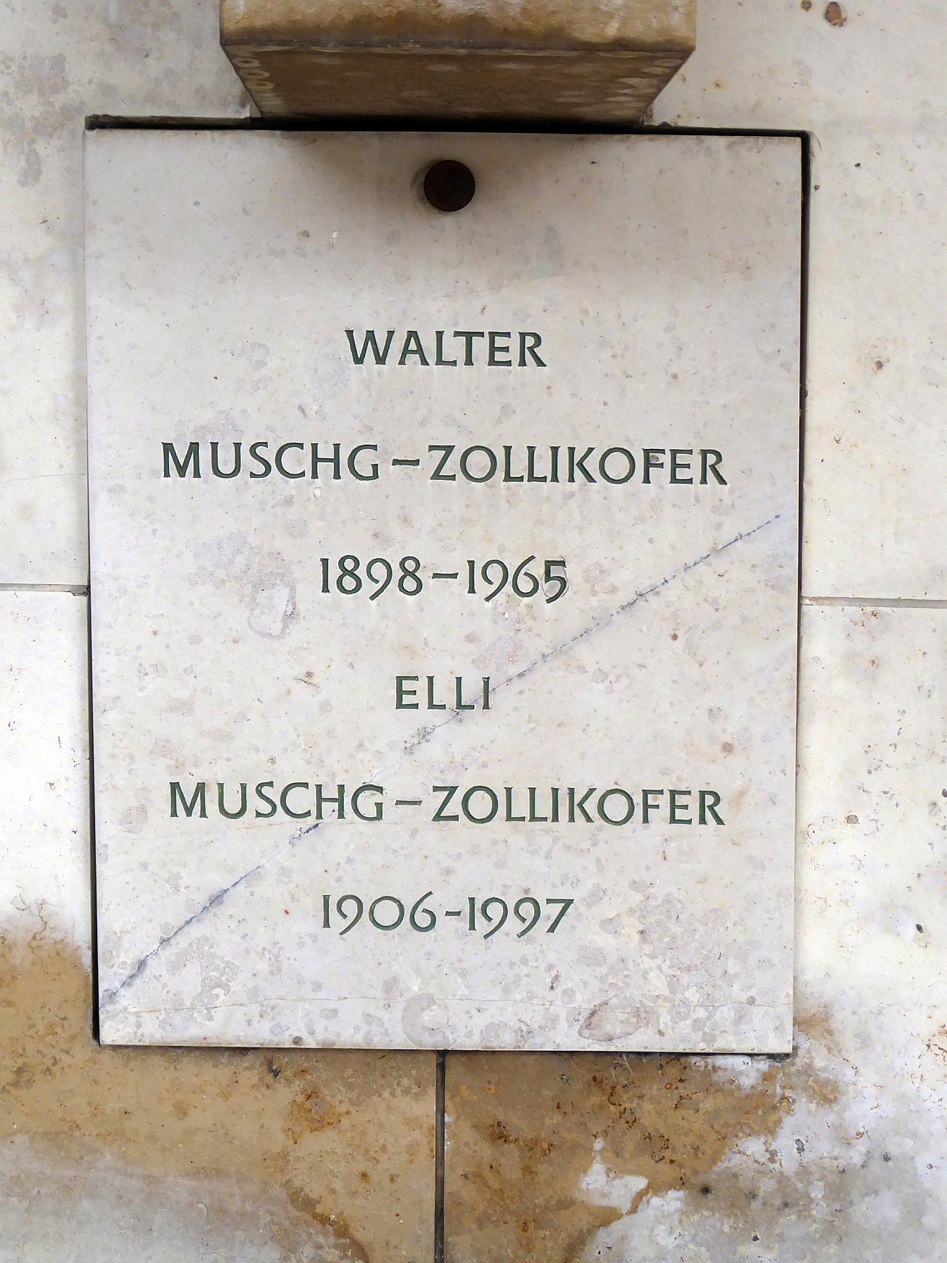 Walter Muschg-Zollikofer (1898–1965) Literaturhistoriker, Essayist, Politiker, Elli Muschg-Zollikofer (1906–1997) Urnen Grab auf dem Friedhof Hörnli, Riehen, Basel-Stadt